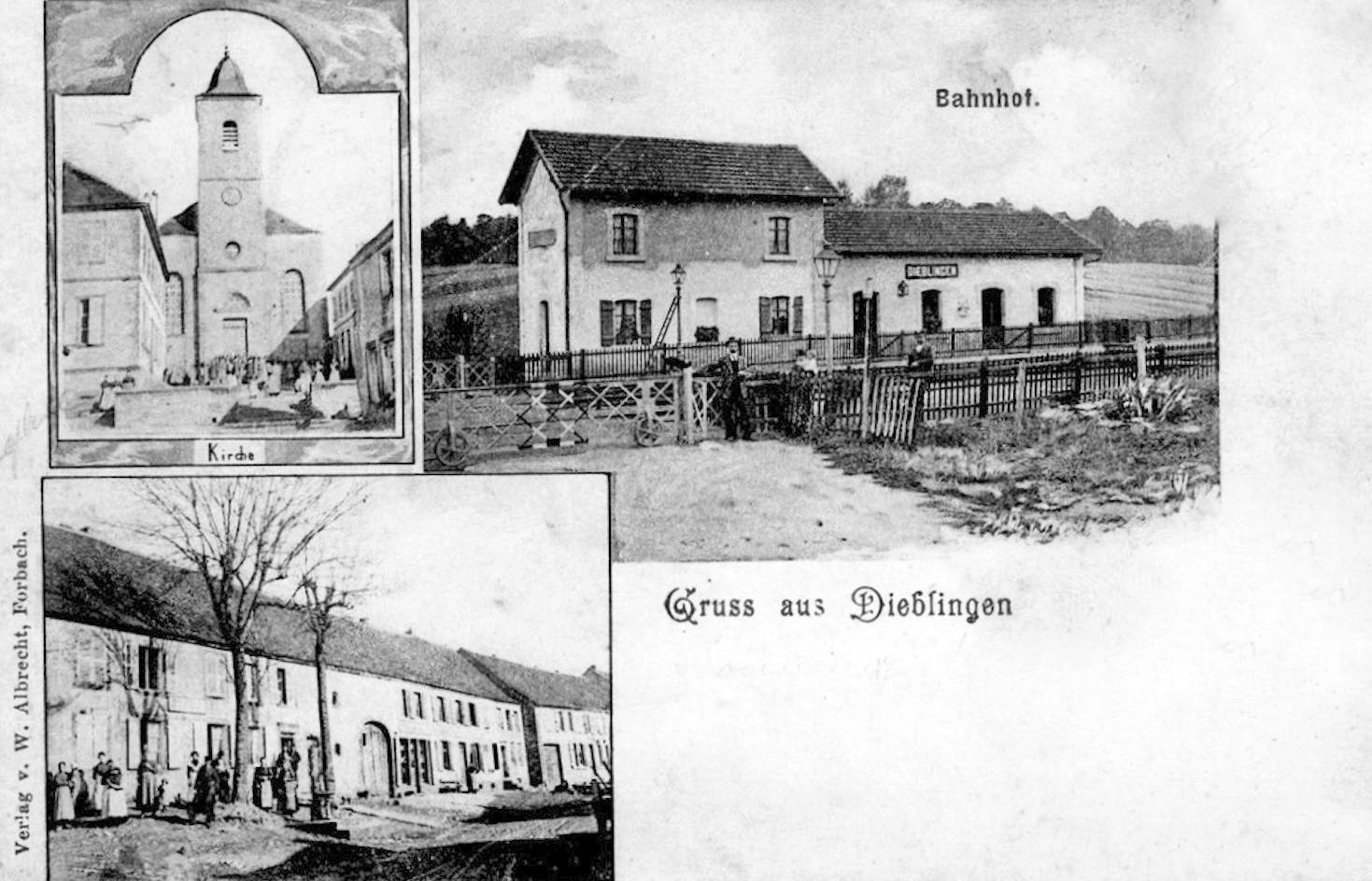 Carte postale allemande montrant des lieux du village de Diebling (Dieblingen), en Moselle à l'époque allemande : des bâtiments du bourg, l'église et la gare située dans l'actuelle rue de la gare.